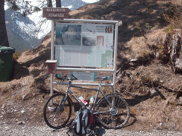 Alte Passhöhe der alten Fernpassstraße an der Via Claudia Augusta